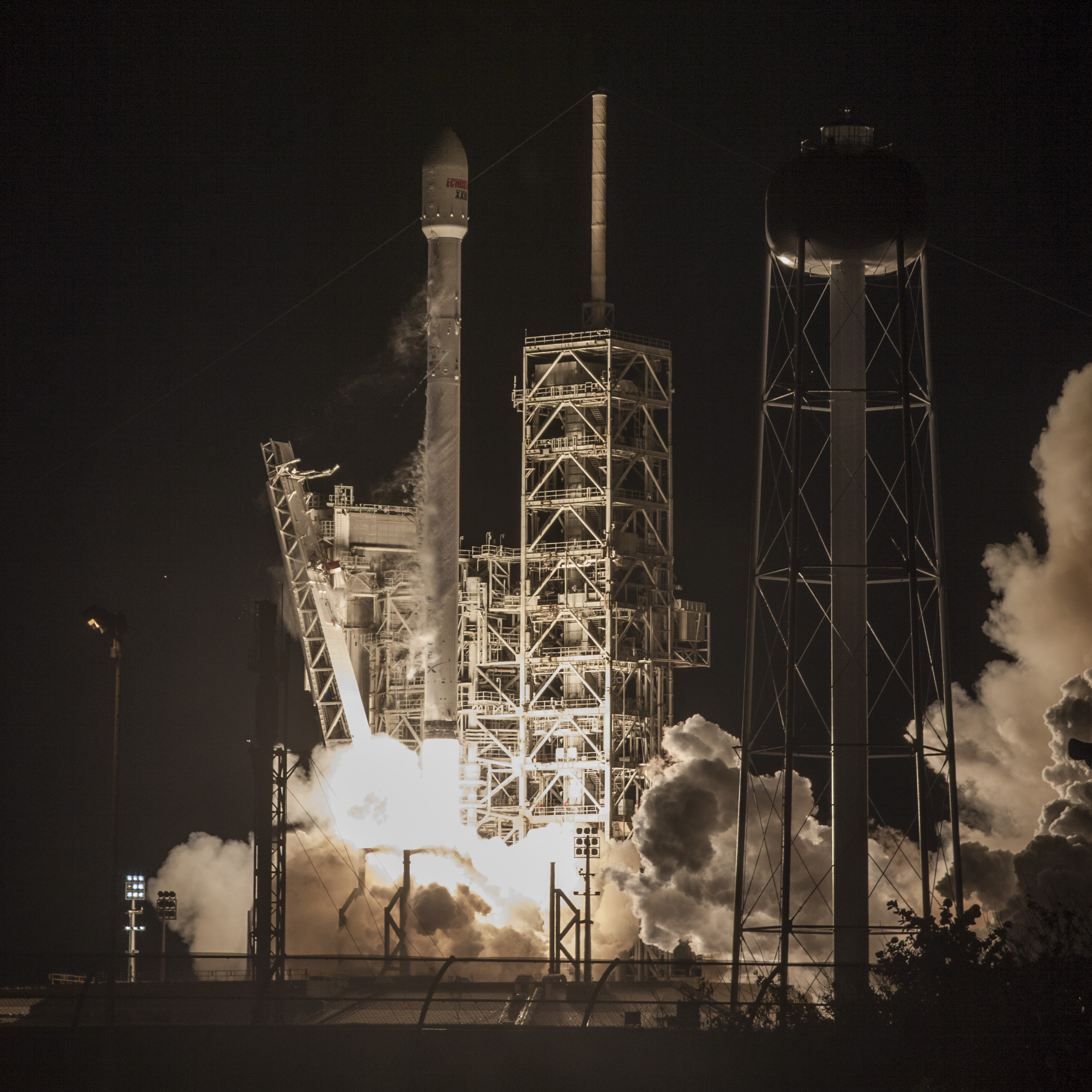 EchoStar XXIII Launch